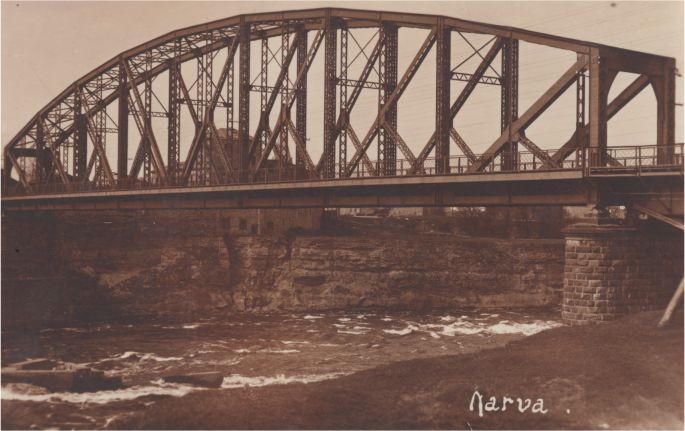 Narva raudteesild 1923. aastal